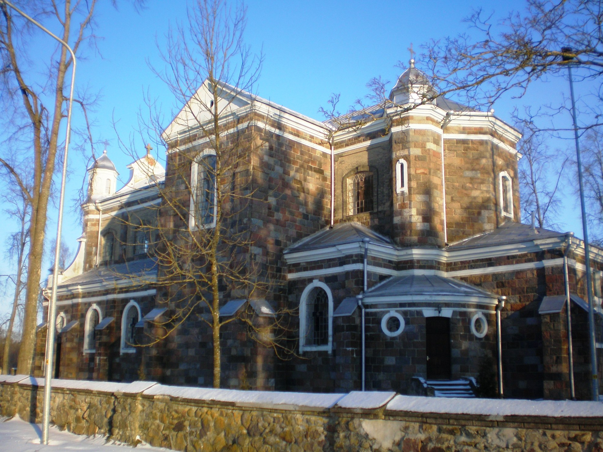 Gegužinės bažnyčia, Kaišiadorių raj.